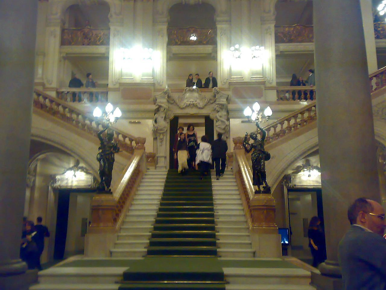 Teatro Municipal de São Paulo